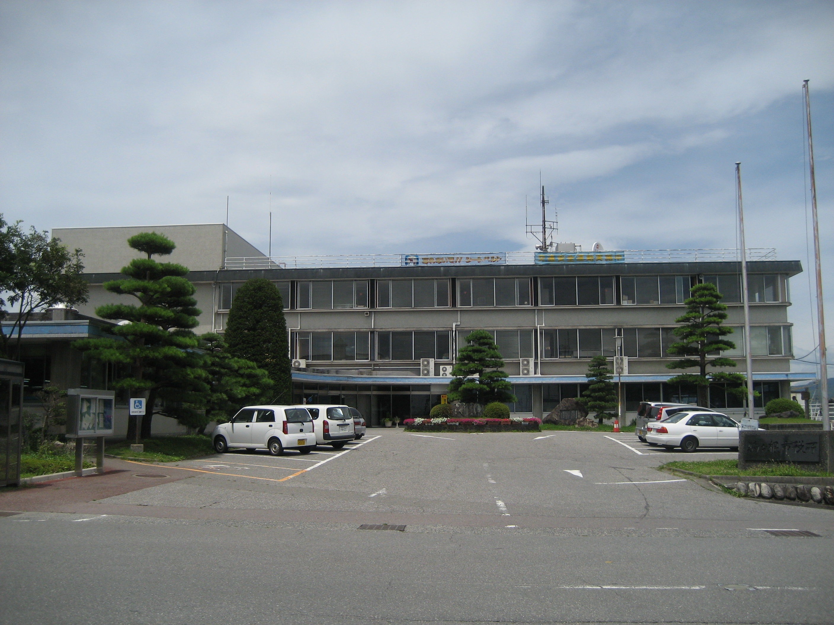 長野県駒ケ根市役所庁舎